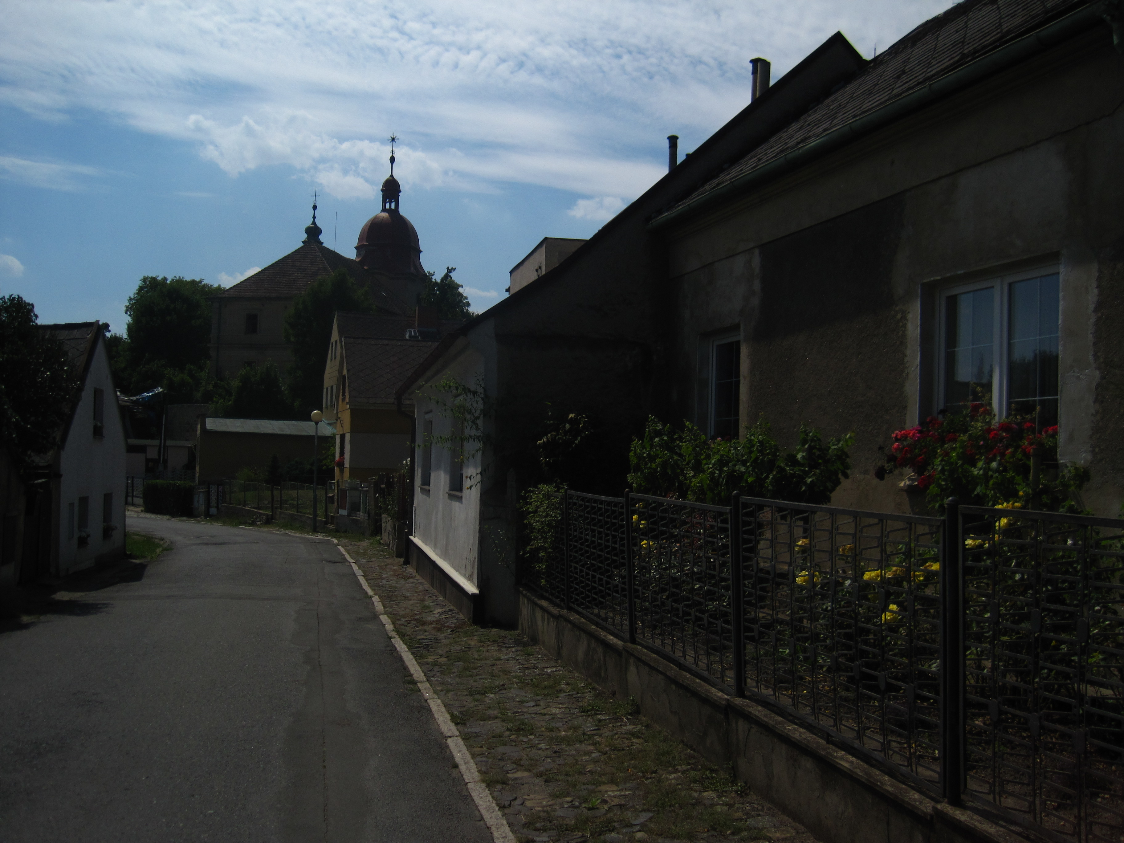 Fara, Palackého náměstí 70 (za kostelem), Dobrovice.